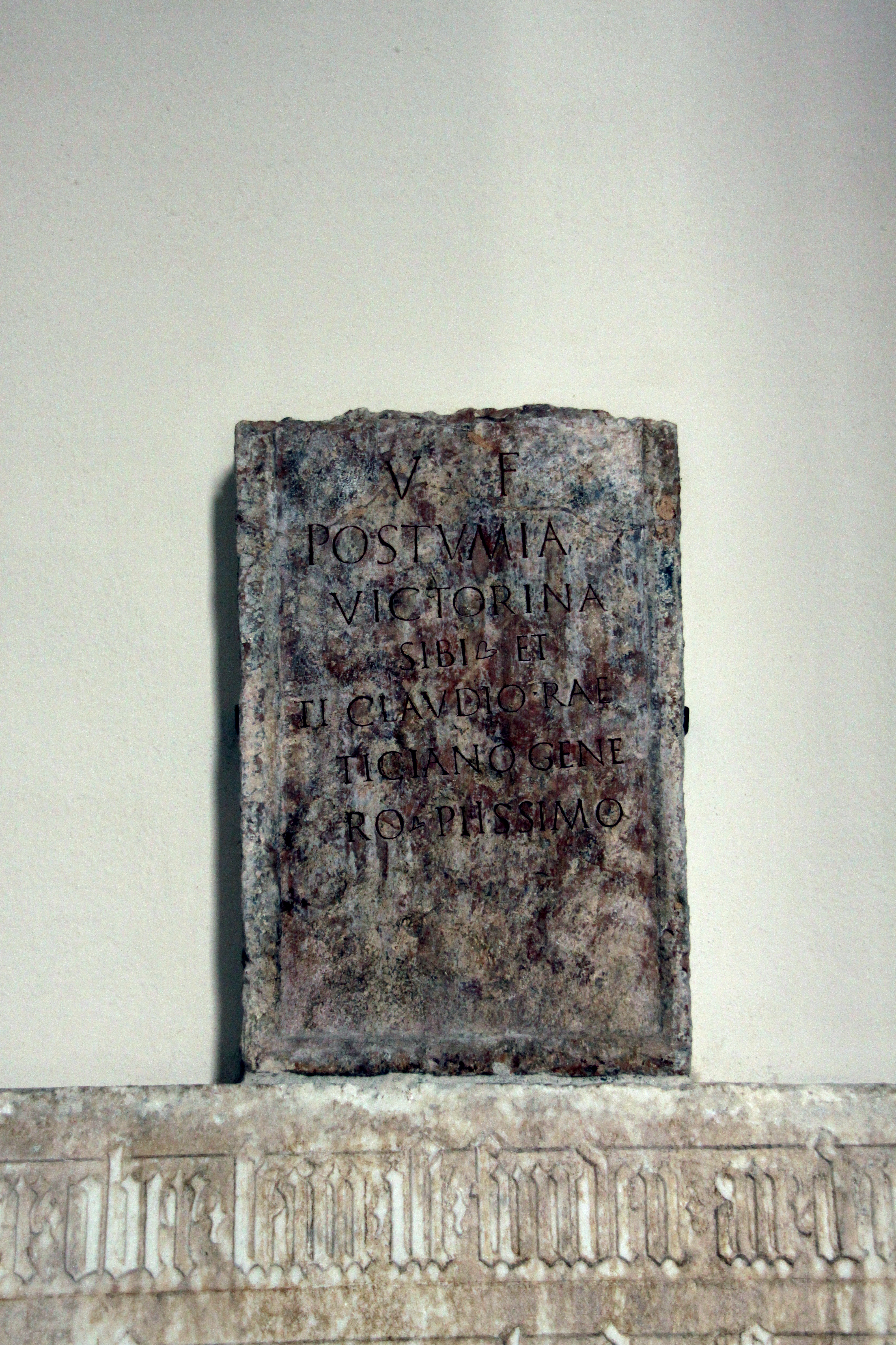 Pfarrkirche Sterzing- Römischer Grabstein